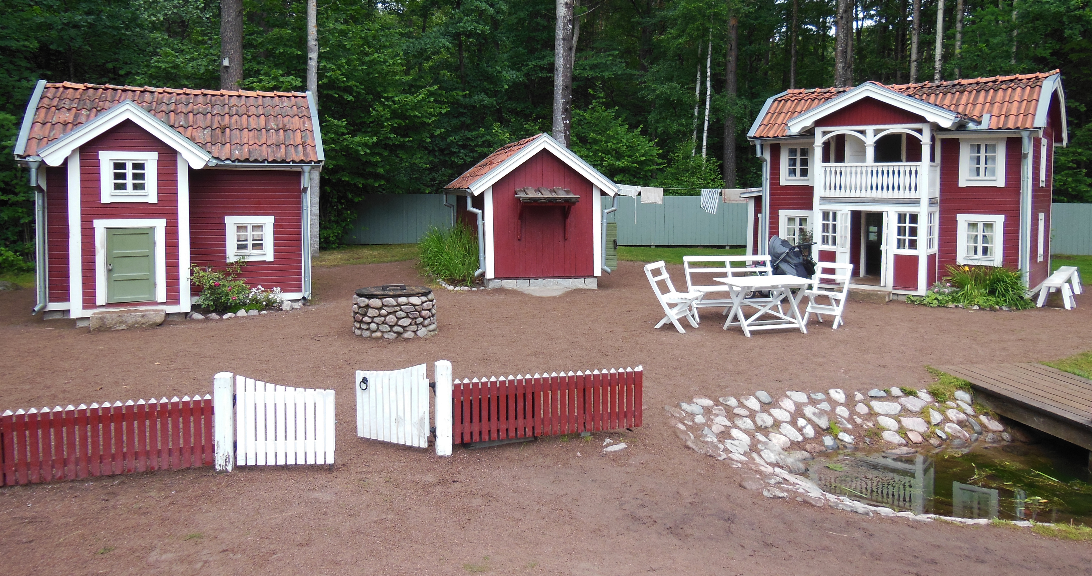 Junibacken på Astrid Lindgrens Värld i Vimmerby, 2014.